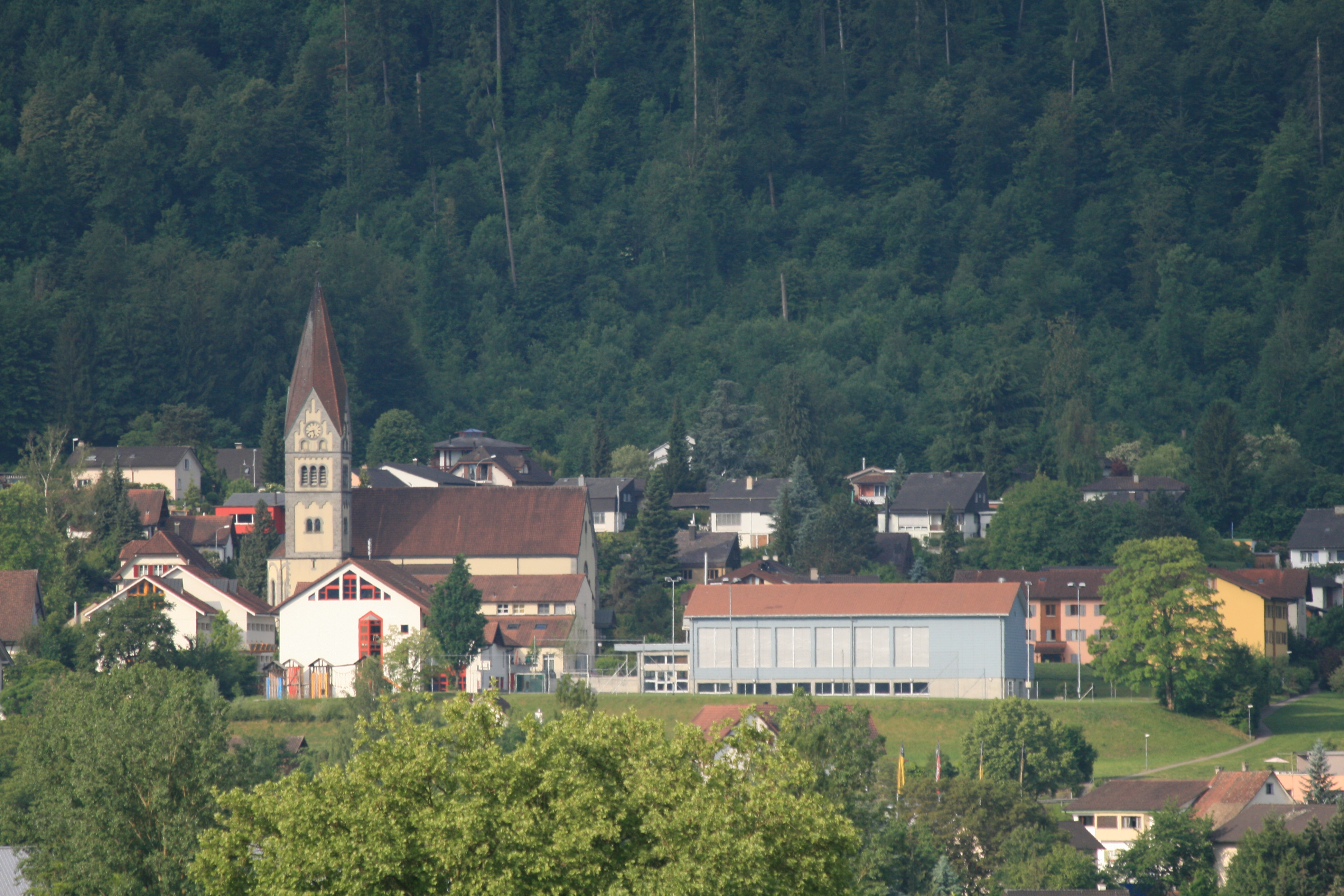 Blick von Mellingen auf Wohlenschwil